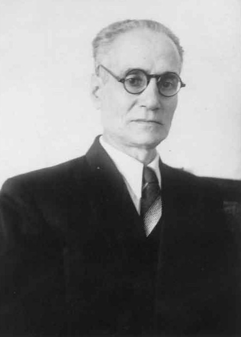 تصویر احمد کسروی